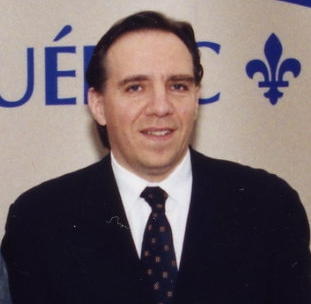 Lors de Mission Québec qui a eu lieu en Argentine et au Chili du 12 au 20 mai 2000 : M. François Legault